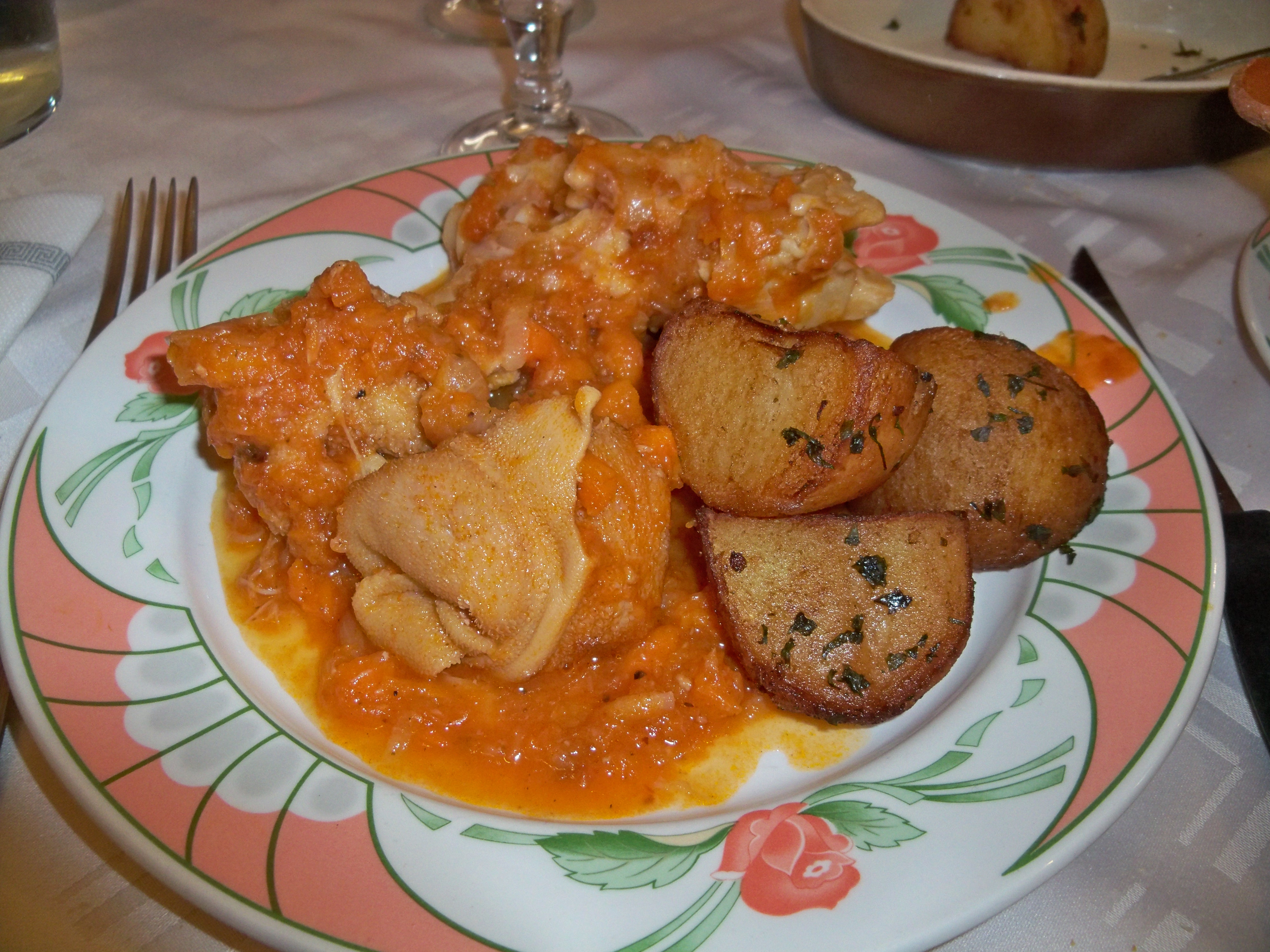 Pieds et Paquets, spécialité de Sisteron (04)